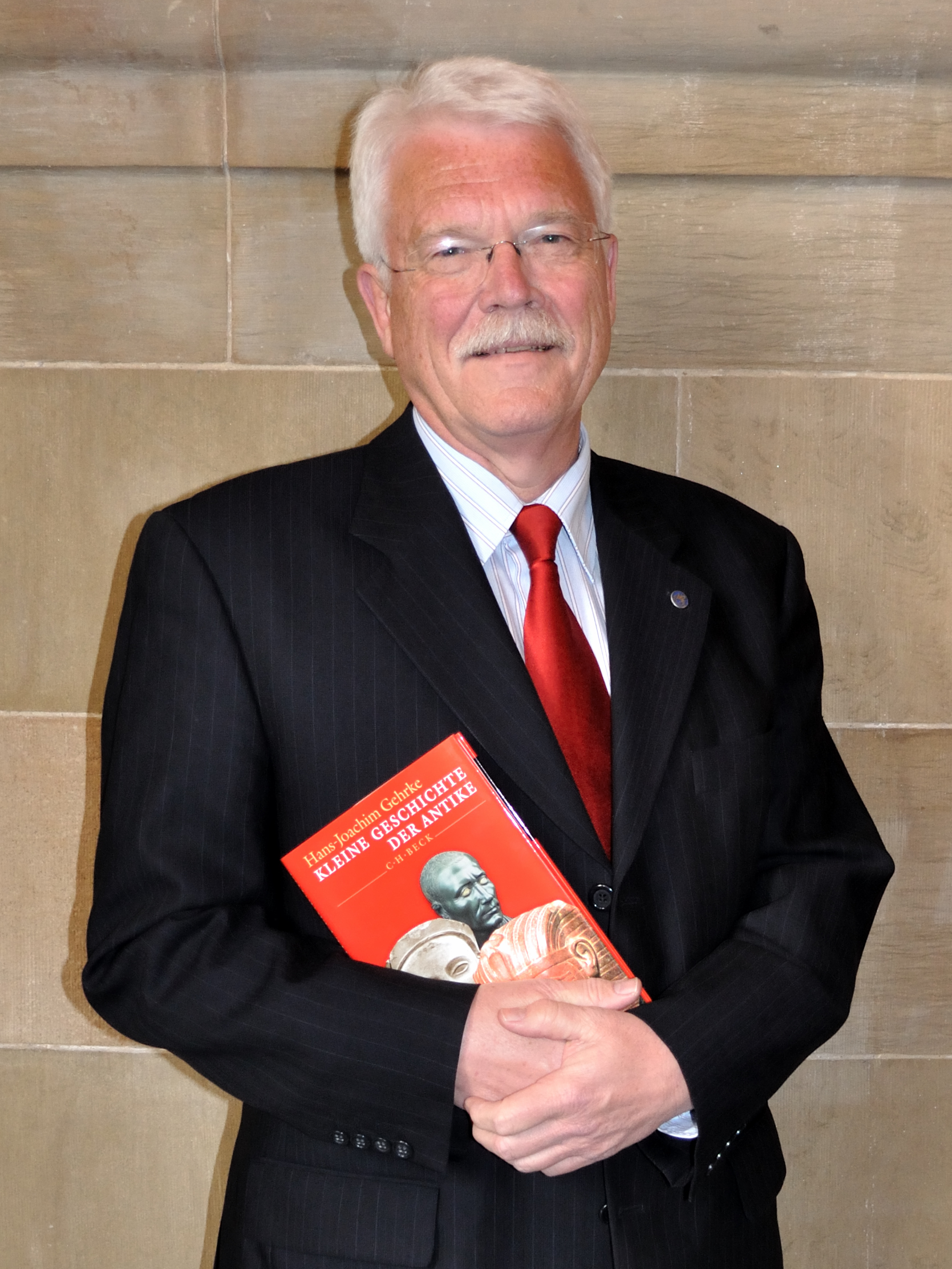 Hans-Joachim Gehrke beim Bundeskongress des Deutschen Altphilologenverbandes des Jahres 2010